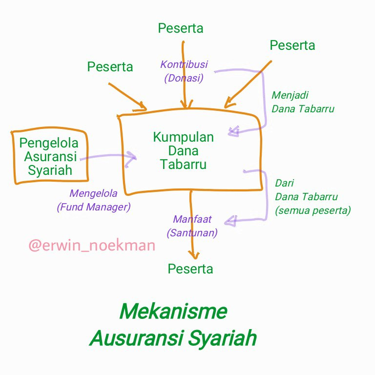 Skema Mekanisme Asuransi Syariah (Takaful)